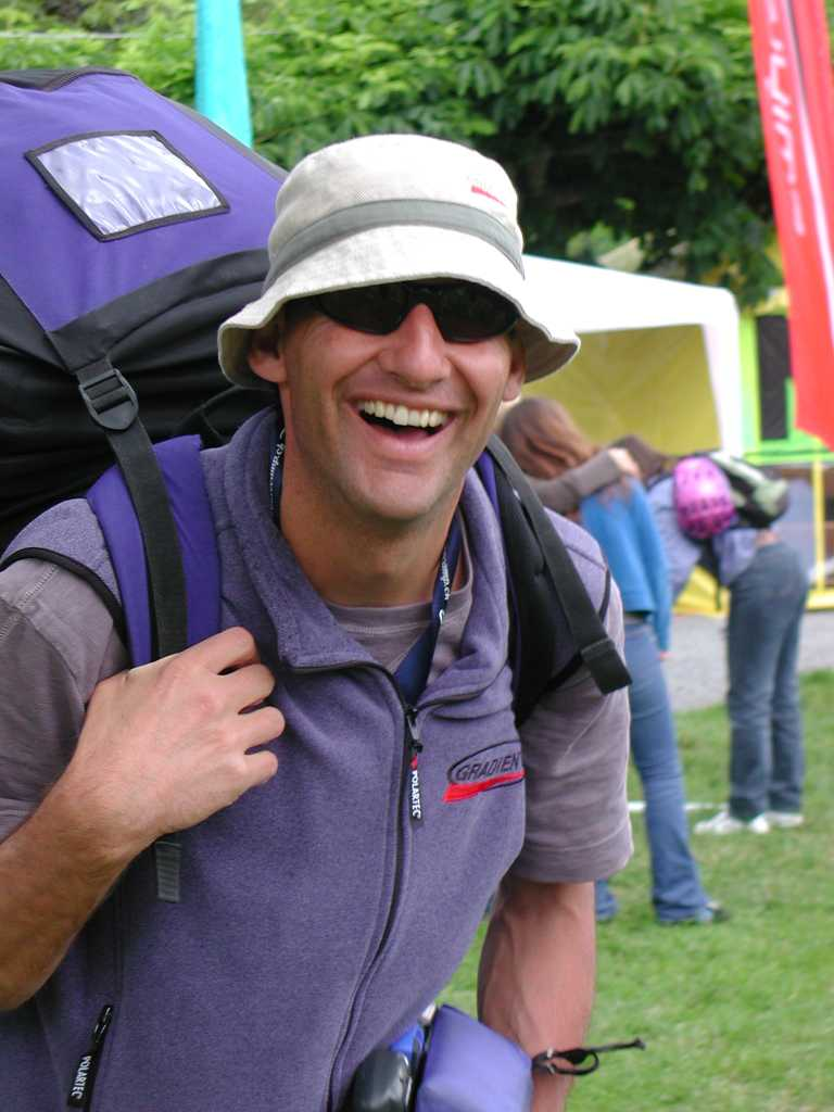 Bild Kaspar Henny